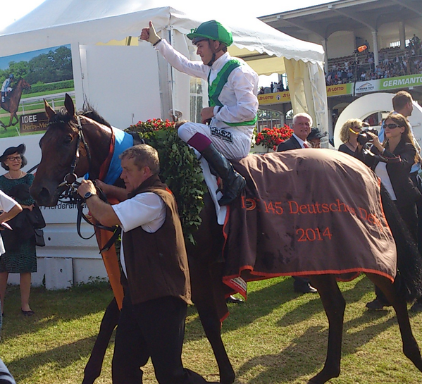 2014年7月6日ハンブルク競馬場